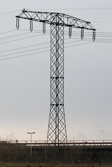 Freileitungsmast der 110-kV-Spannungsebene in Sachsen.